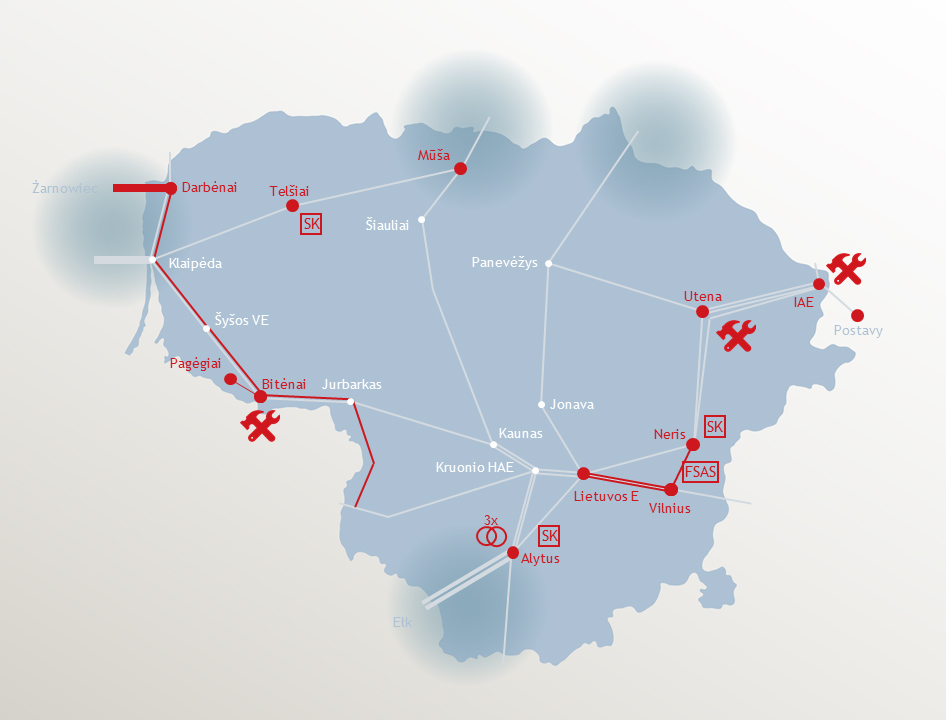 Automatinis generacijos valdymas